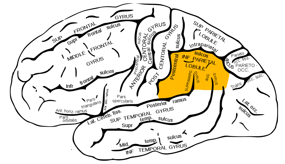 inferior parietal lobule.